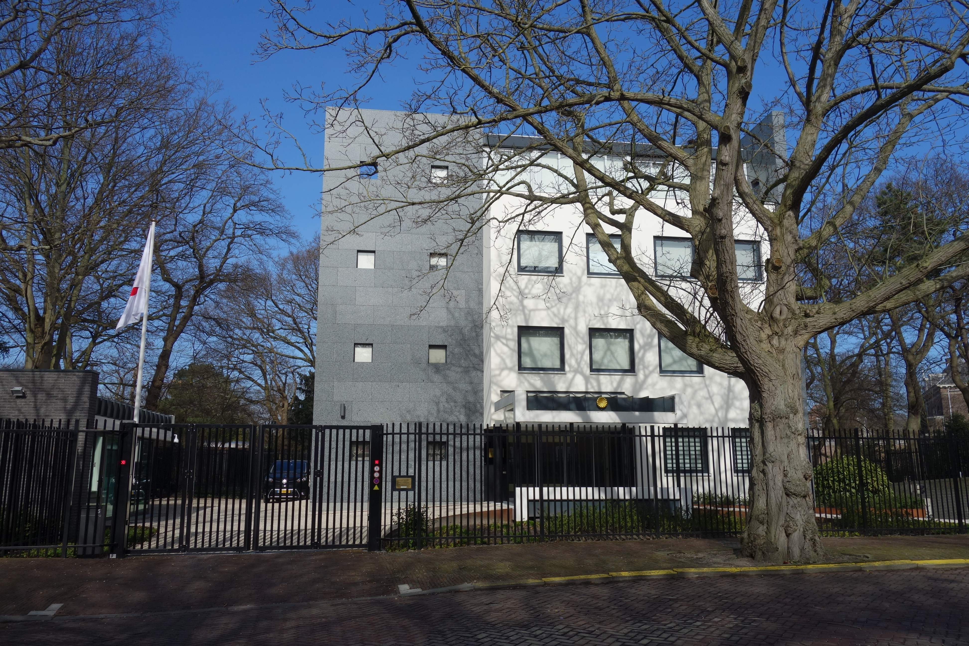 Nieuwe Japanse ambassade aan de Tobias Asserlaan. De oude ambassade ligt ten zuid-westen van de nieuwe: Tobias Asserlaan 2.